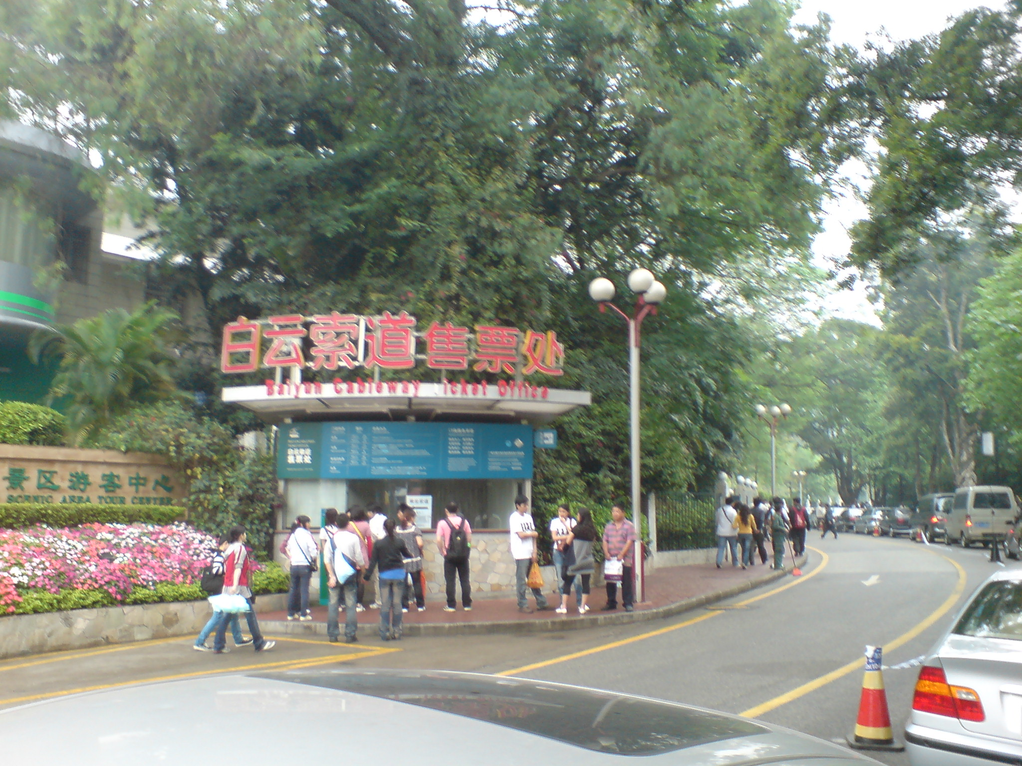 中文（中国大陆）: 白雲索道售票處